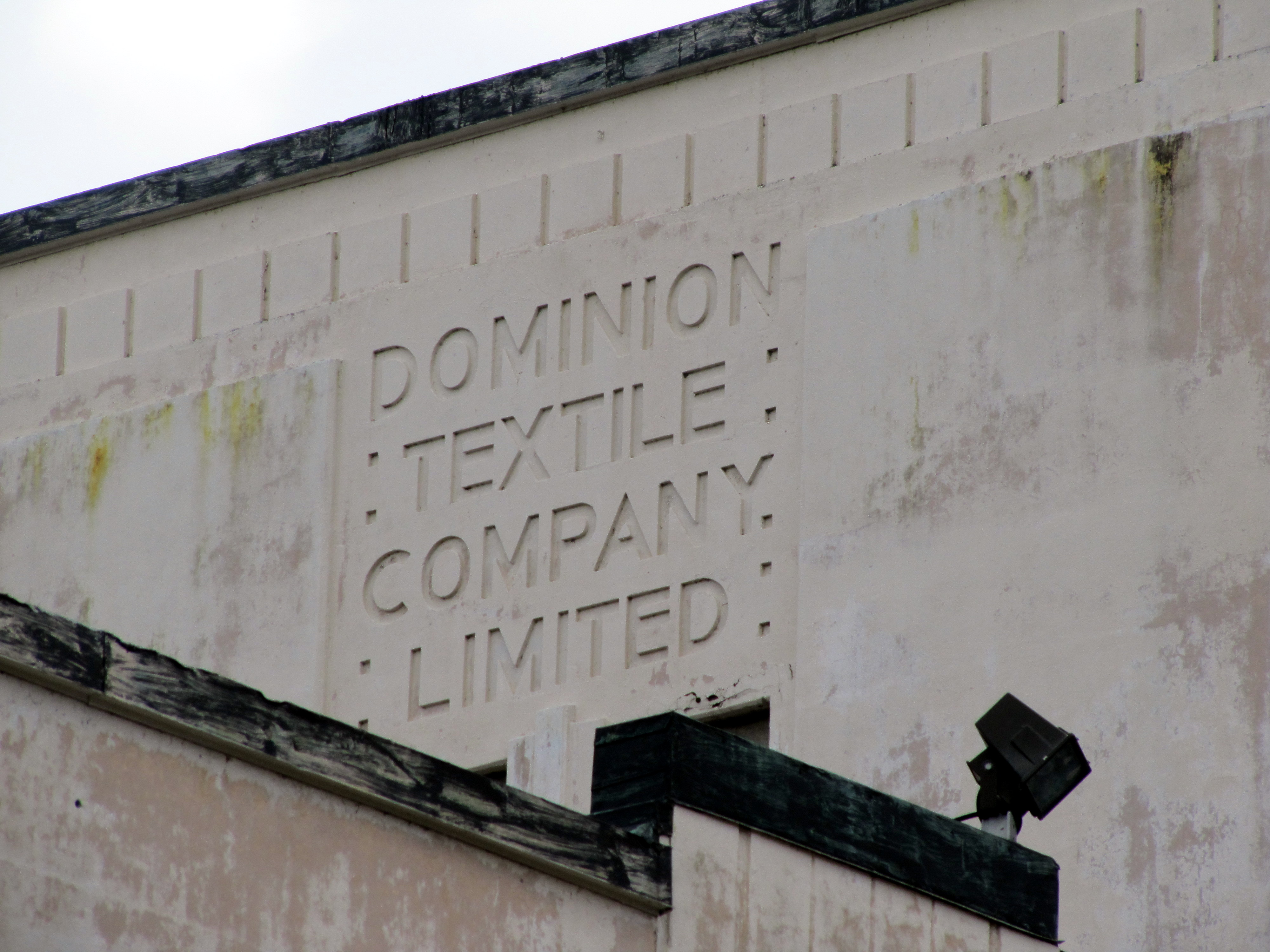 Usine de textile de Magog. Lieu historique national du Canada (id : 638). Située au 160 rue Principale Est à Magog, Québec.